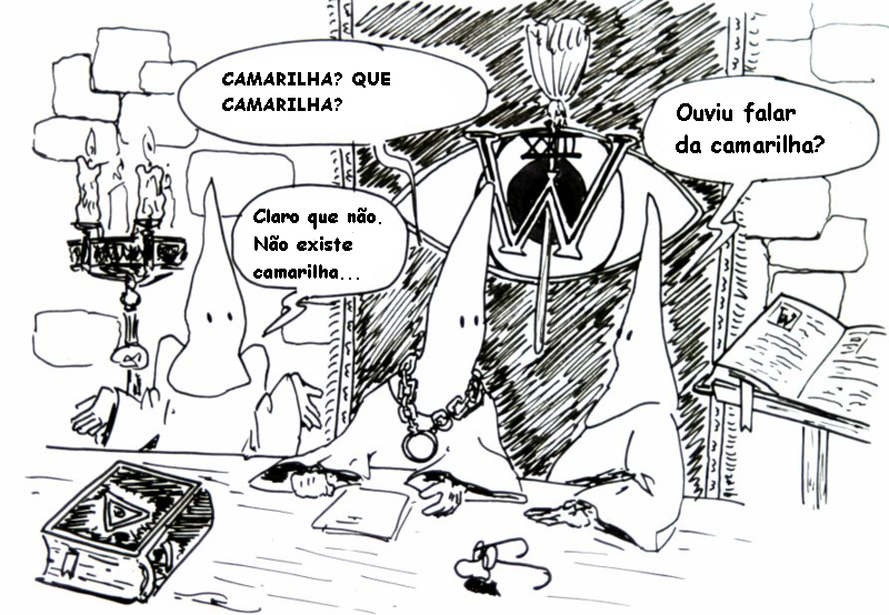 Versão em português da de Pasdecabale.jpg, "cometida" no Paint do Windows.